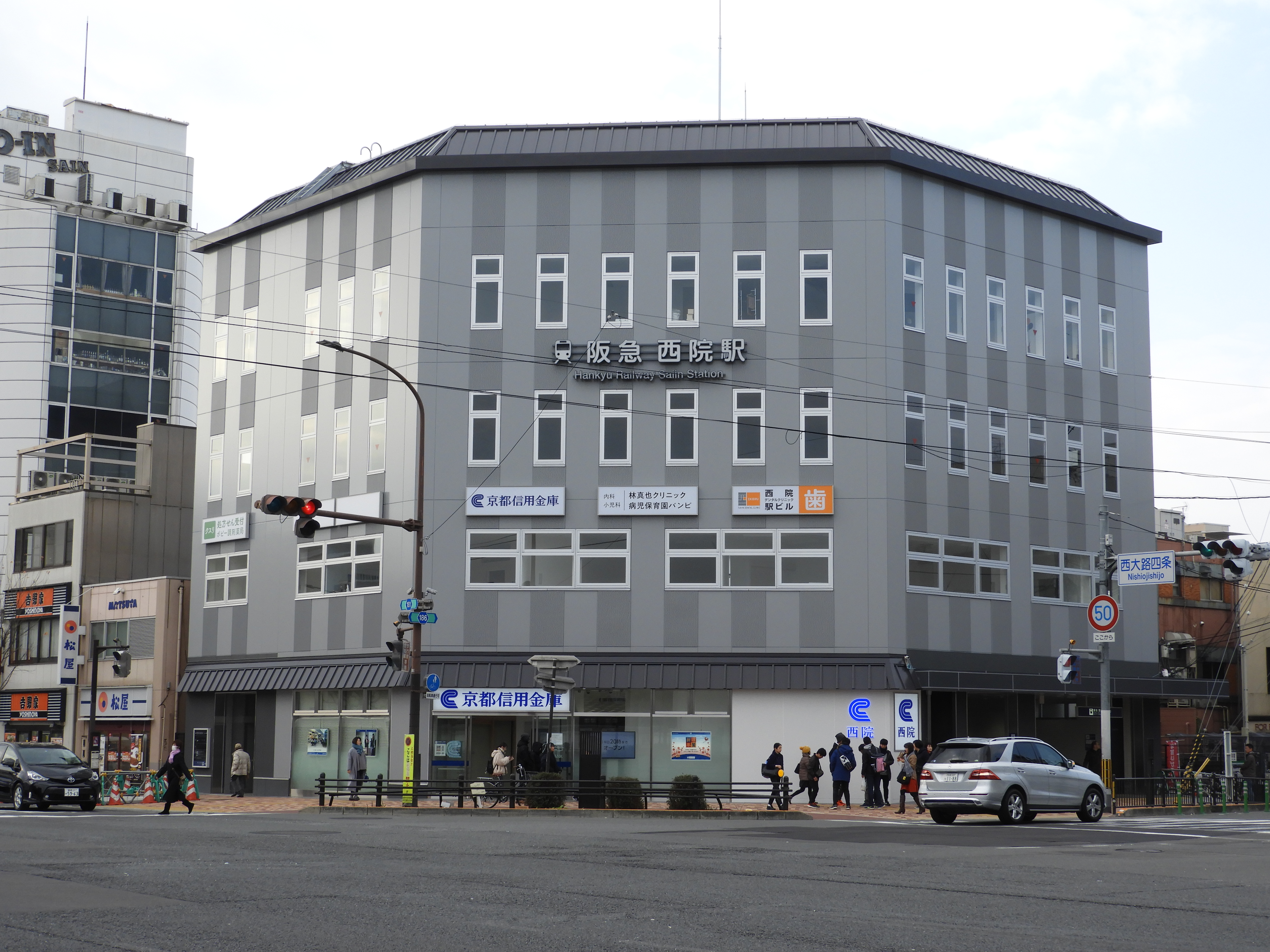 阪急西院駅西改札口（2020年撮影）